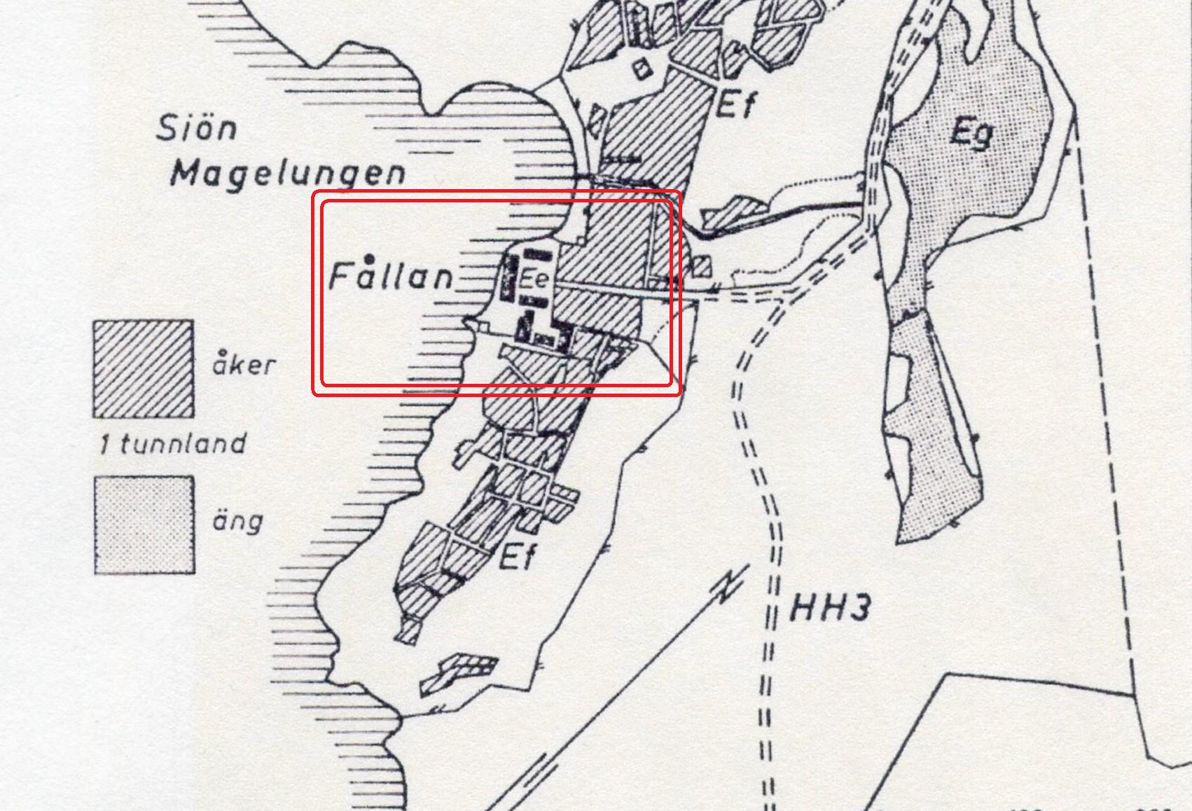 Concept Charta öfver Länna by avmätt 1758 af Jonas Collin (del av senare rekonstruktion)